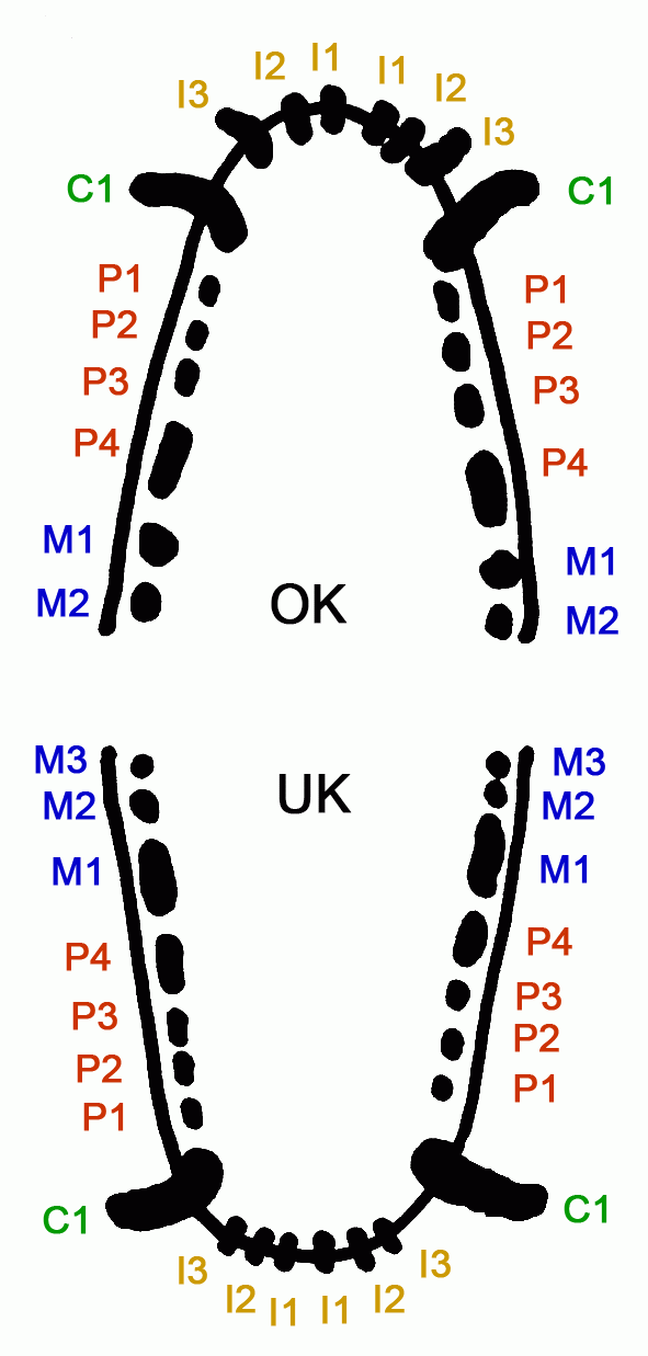 Zahnformel beim Ausgewachsenen Hund Selbst gezeichnet von Caronna 18:35, 28. Jan 2006 (CET)